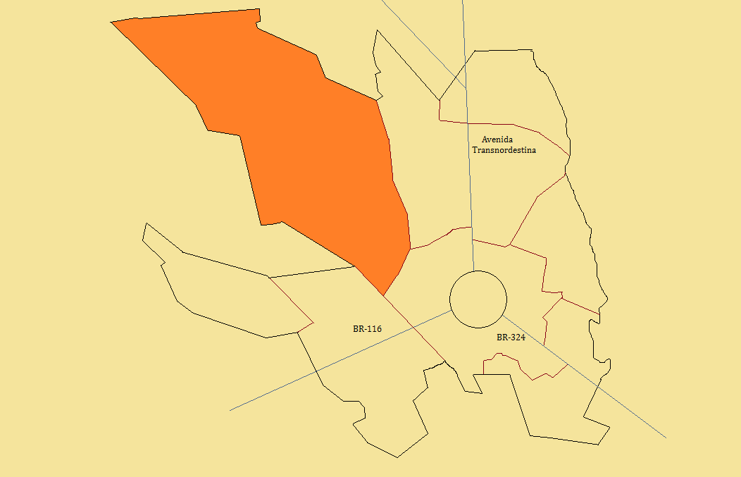 Distrito Jaguara em cor laranja, em Feira de Santana, Bahia, Brasil.